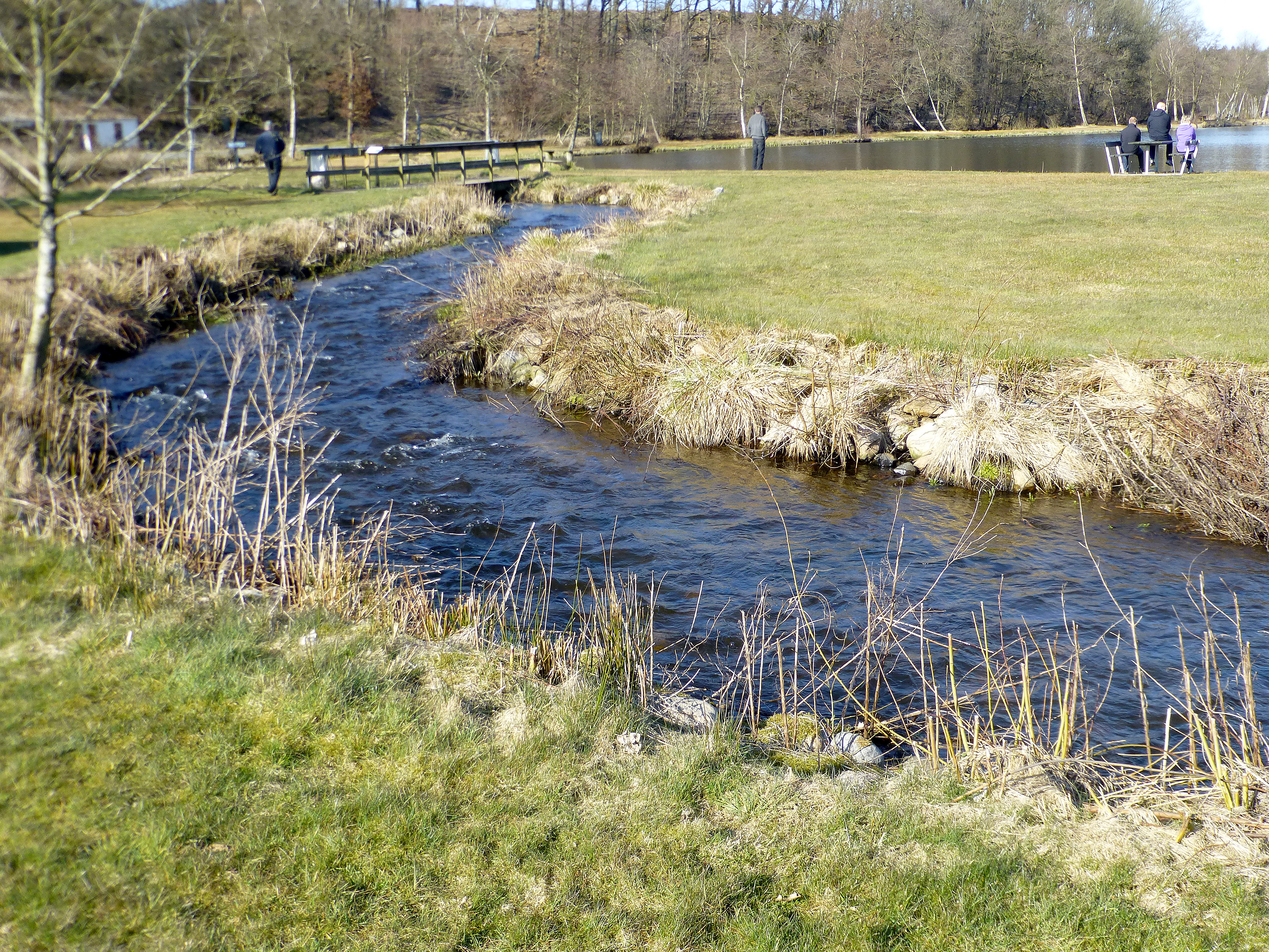 Skjern Å ved udløbet af Rørbæk Sø